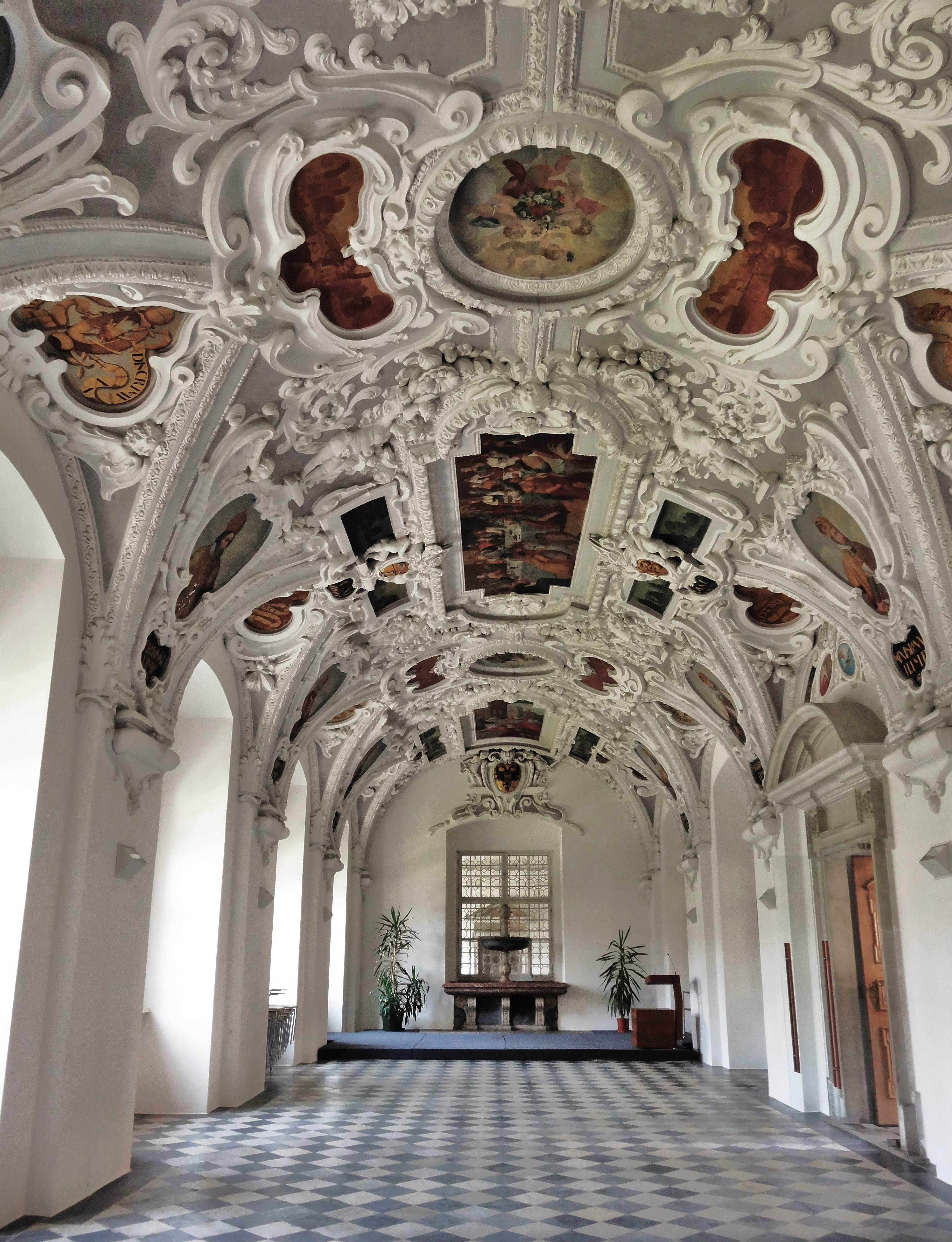 Benediktinerstift St. Lambrecht, der Kaisersaal